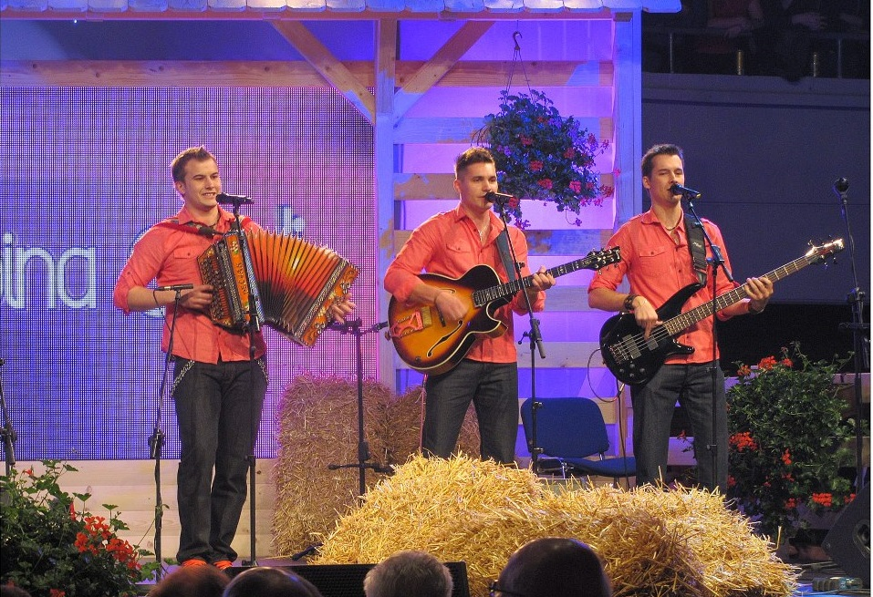 Gadi na Noči Modrijanov 2012.